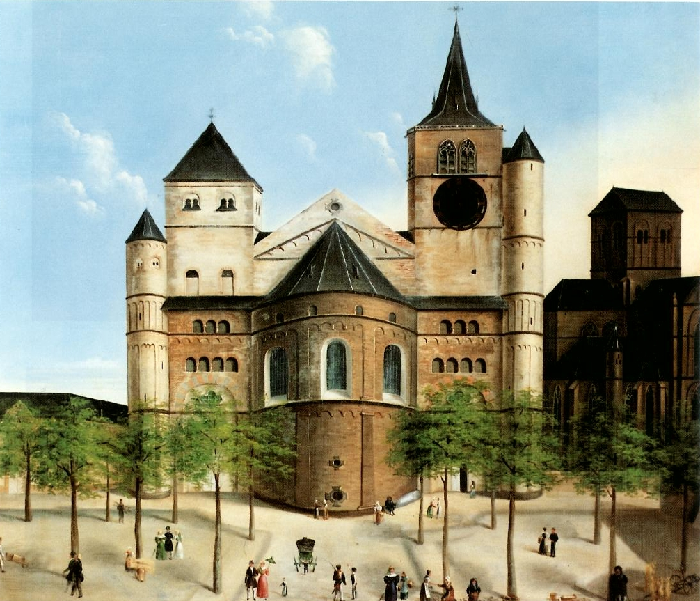 Bilderuhr "Dom zu Trier", gemalt von Ludwig Neureuter in Trier, um 1840 (Stadtmuseum Simeonstift Trier)